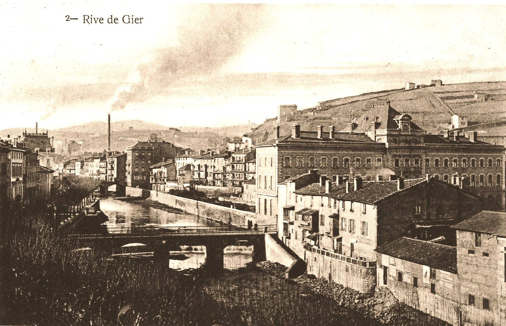 Rive-de-Gier, le Gier et l' Hôtel de Ville (ancien Hôtel du Canal construit entre 1792 et 1796).